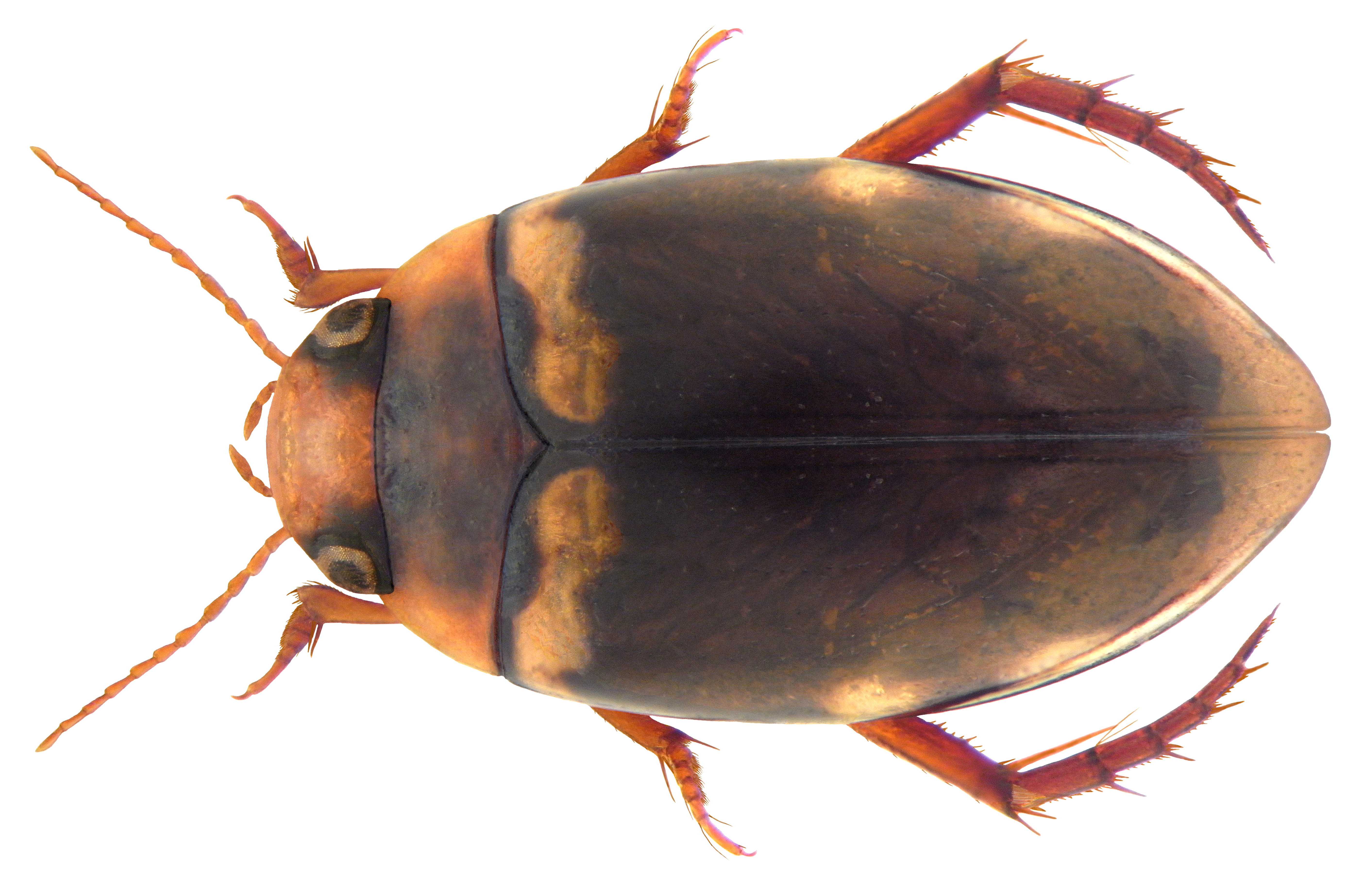 Lacconectus basalis Sharp Familie: Dytiscidae Groesse: 5,5 mm Fundort: Malaysia, Langkawi leg. U.Schmidt, 2009; det. A.Skale, 2010 Photo: U.Schmidt, 2010